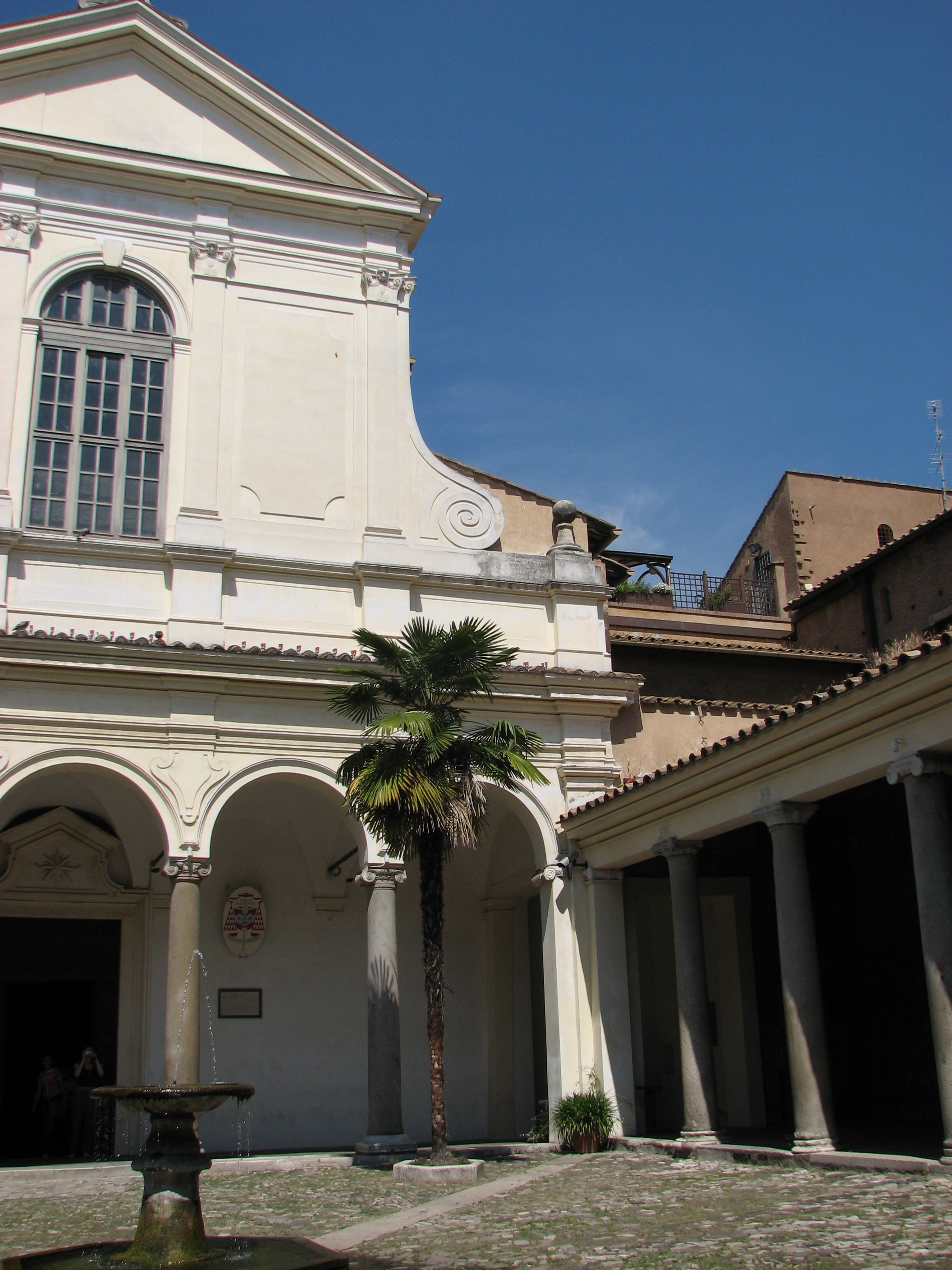 Roma, Italia